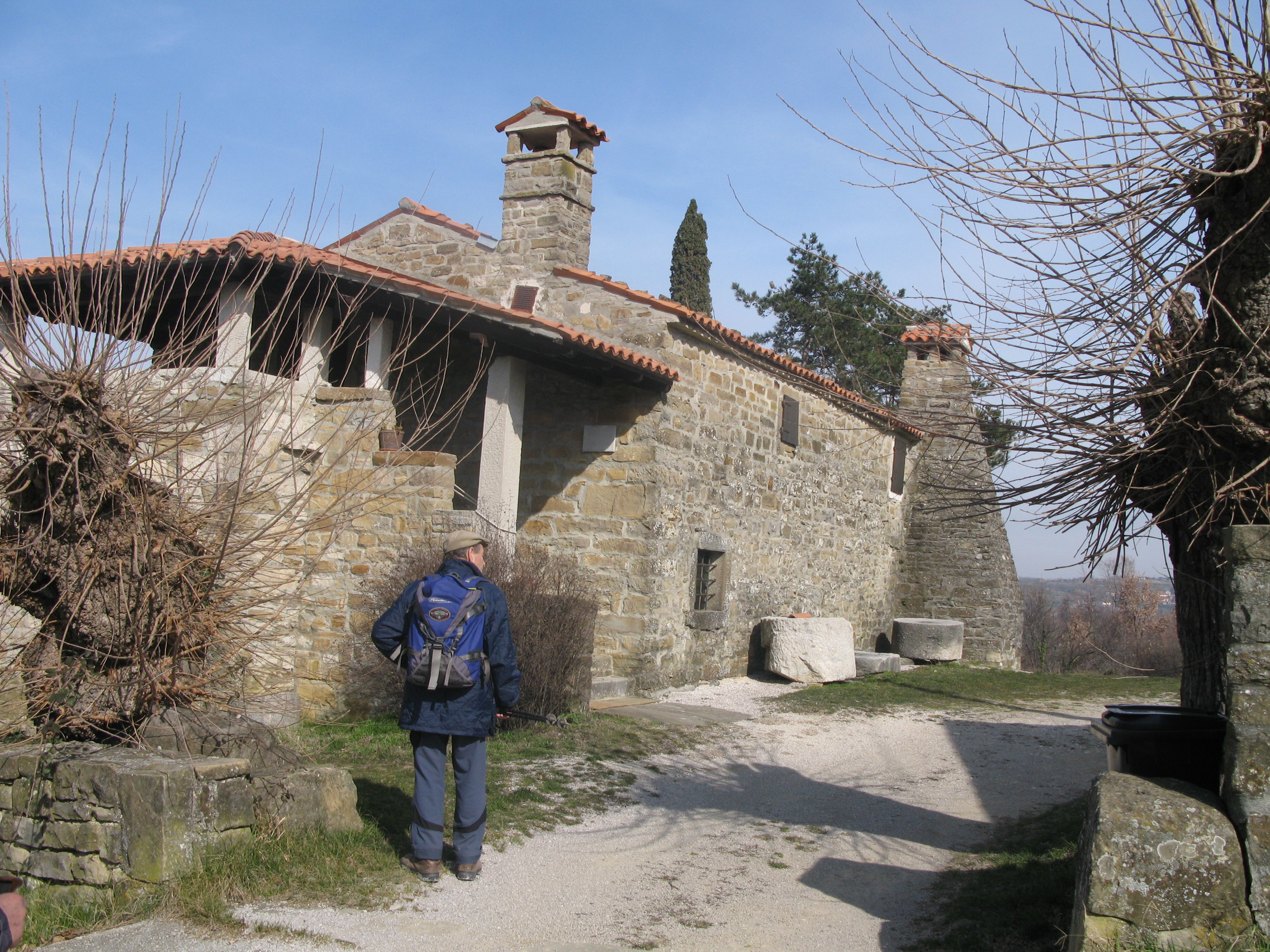 Sveti Peter